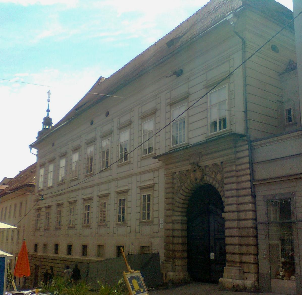 Palais Saurau in der Sporgasse, Graz